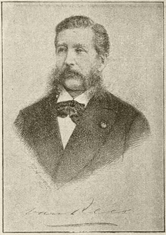 Willem Adriaan van Rees